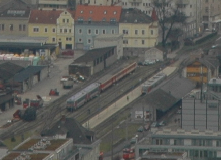 Mühlkreisbahnhof in Linz, fotografiert von der Franz Josef Warte am Linzer Römerberg/Freinberg